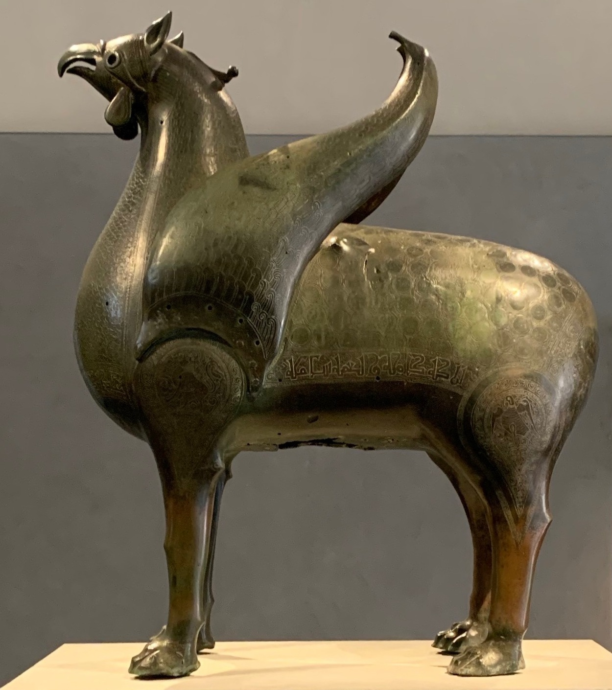 Grifone di Pisa al nuovo museo dell'opera del Duomo di Pisa